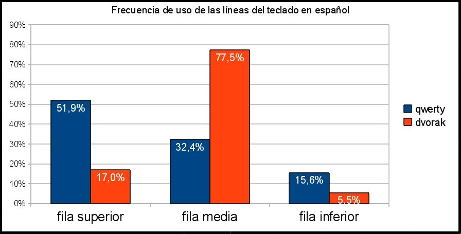 Frecuencias de uso de las líneas del teclado usando QWERTY y Dvorak para un texto español